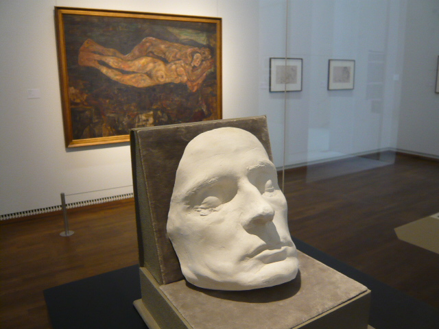 Egon Schieles Totenmaske, im Hintergrund sein Gemälde Das Liebespaar (1918)